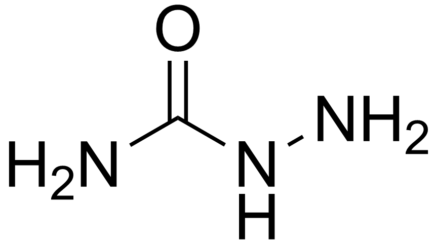 chemical structure of semicarbazide